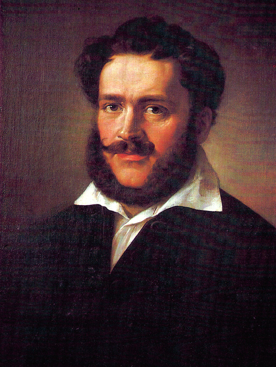 Wesselényi Miklós. Barabás Miklós festménye